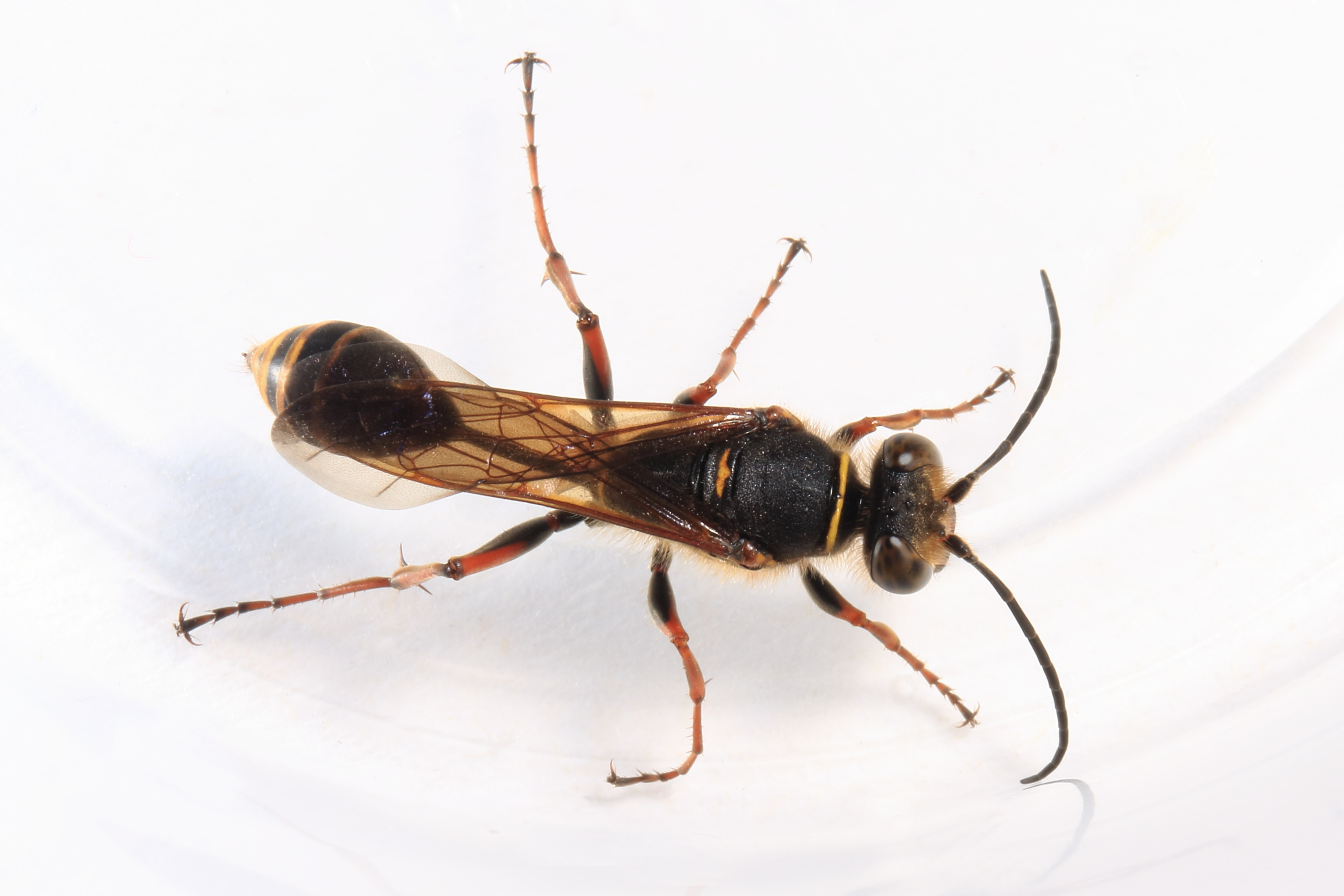 Orientalische Mauerwespe, Sceliphron curvatum, Körperlänge ca. 19 mm, von unten durch Plastikdeckel fotografiert. (Kringel am Auge = Fehler im Plastik) Das abgebildete Insekt wurde am 27. Juni 2015 von Meloe auf WP:RBIO/B bestimmt The insect shown here has been identified by Meloe on WP:RBIO/B 2015, June 27th